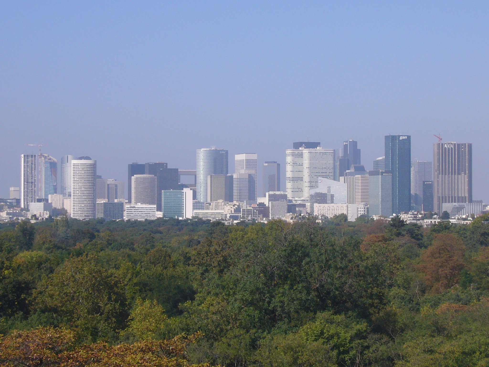 Rascacielos de La Defense, Francia, cerca de París.